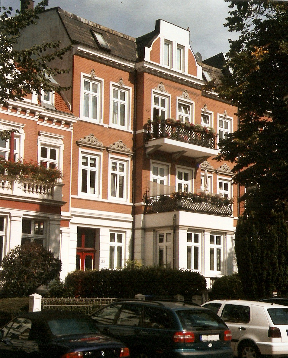 Der Lübecker Wohnsitz Schaumanns